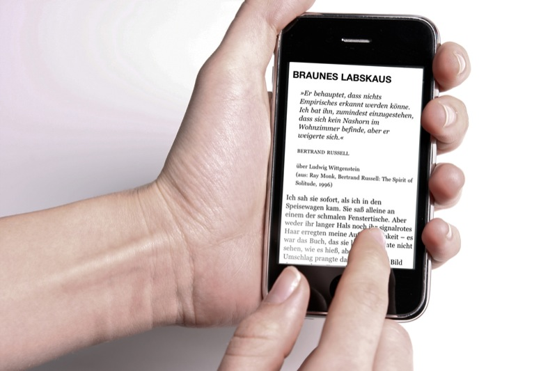 „PUDER“ von Tor Åge Bringsværd als E-Book auf dem iPhone